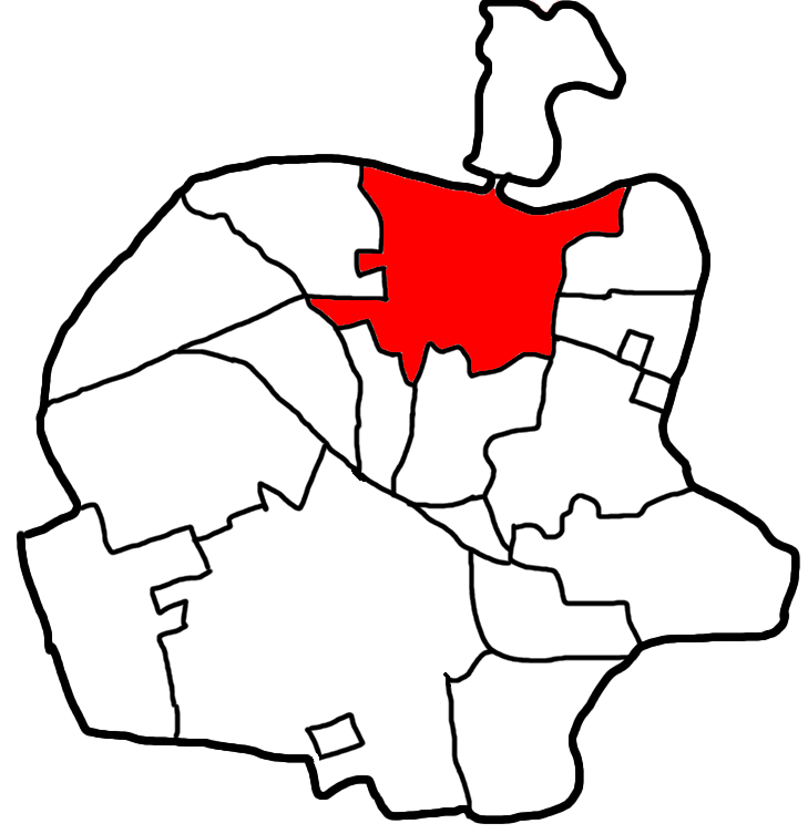 În această imagine este Făgărașul împărțit în cartiere. Cartierul în roșu este Centru.